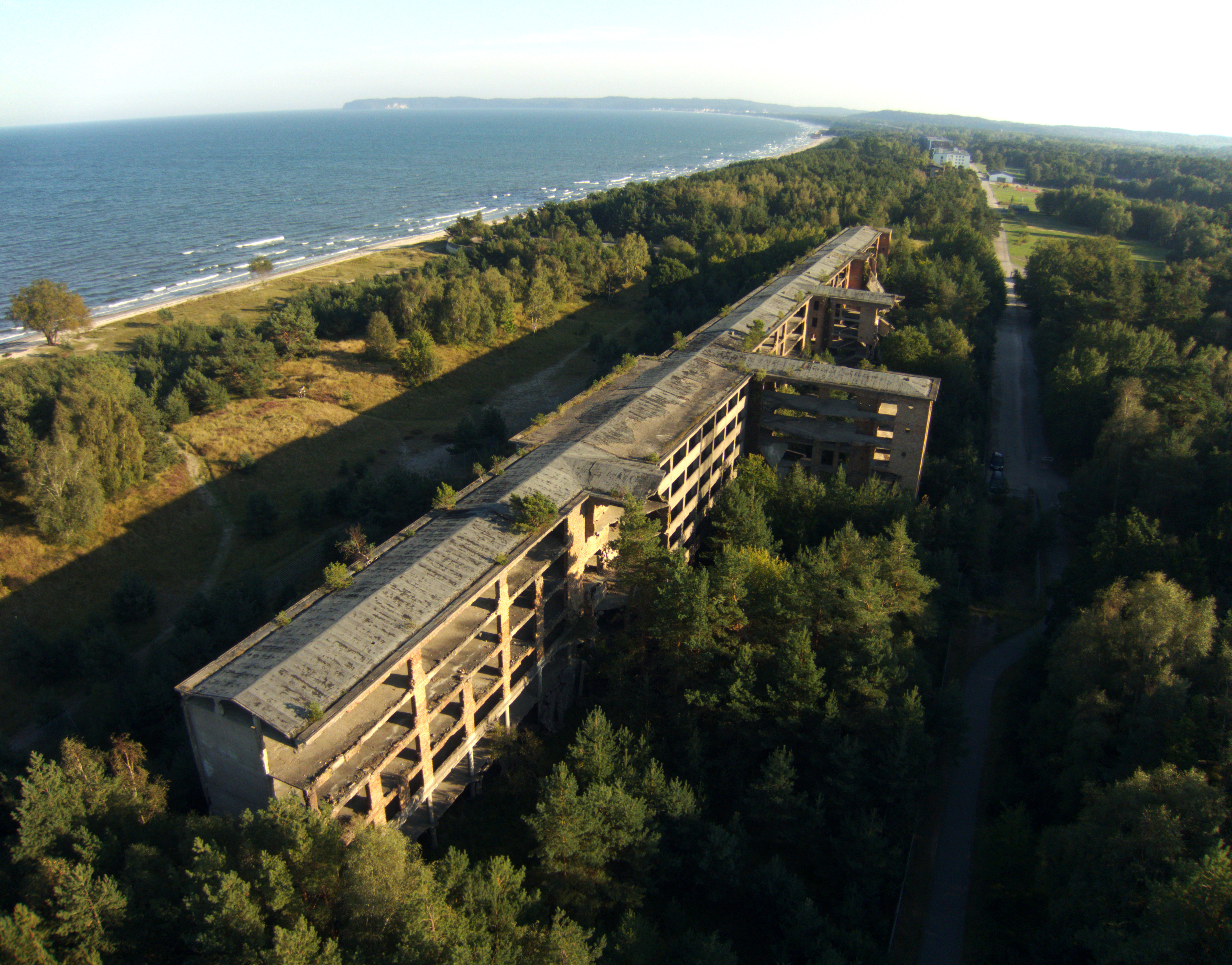 Unvollendeter, verfallender KdF-Bau im Ostseebad Prora bei Binz auf der Insel Rügen. Abgebildet ist der beinahe letzte Gebäudeteil auf der Nordwest-Seite. Das Bild zeigt den fortschreitenden Verfall der stark einsturzgefährdeten Gebäudeteile, die vermutlich nicht mehr ewig zu erhalten sind. Prora befindet sich zwischen den Orten Sassnitz und Binz an der Prorer Wiek.